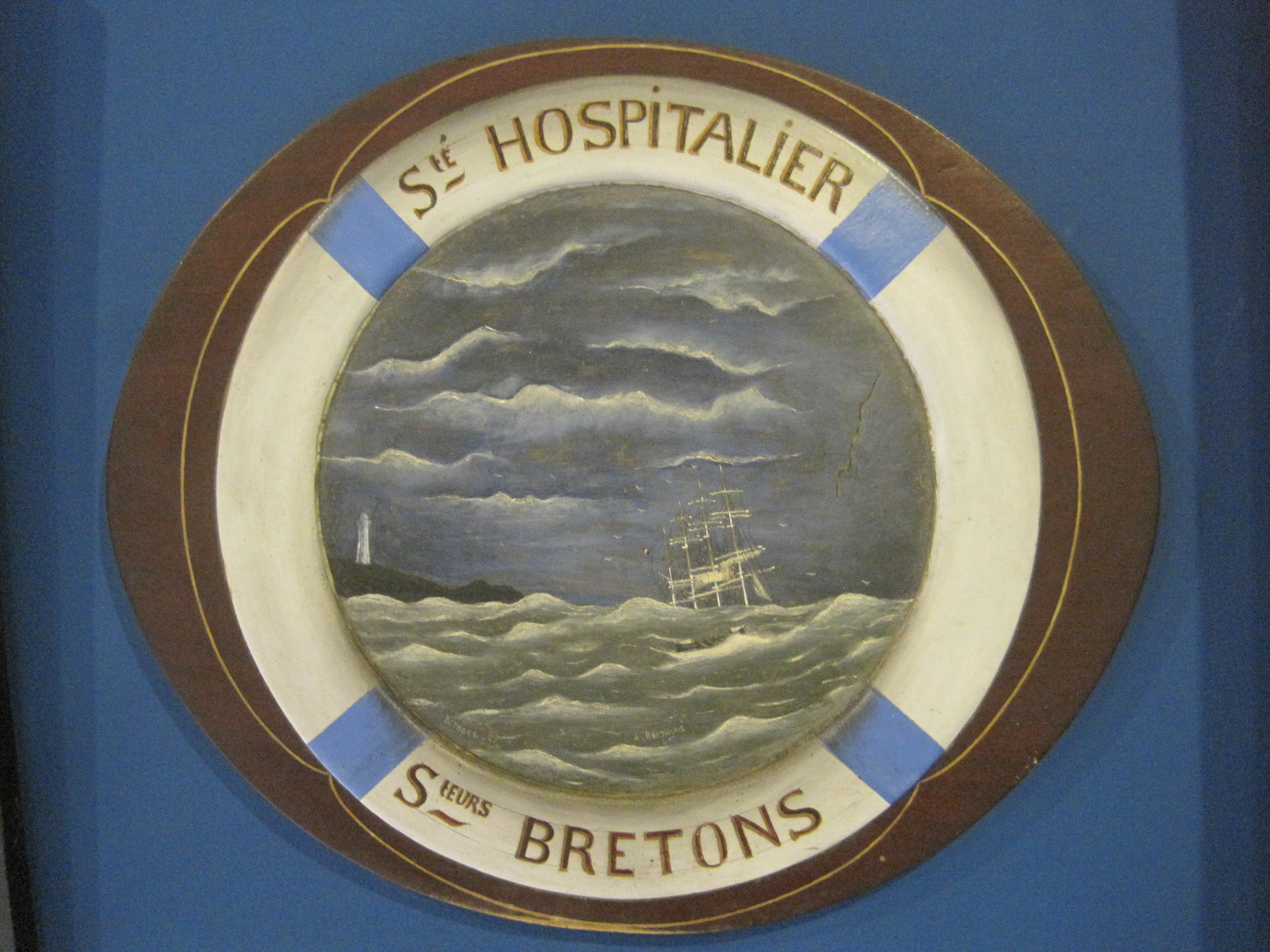 scène de naufrage peinte par Auguste Berthomé, marin de La Guérinière (dans l'ile de Noirmoutier) sur le support d'un miroir pivotant. Octobre 1927, huile sur bois, collection Musée de la construction navale, Château de Noirmoutier en l'ile